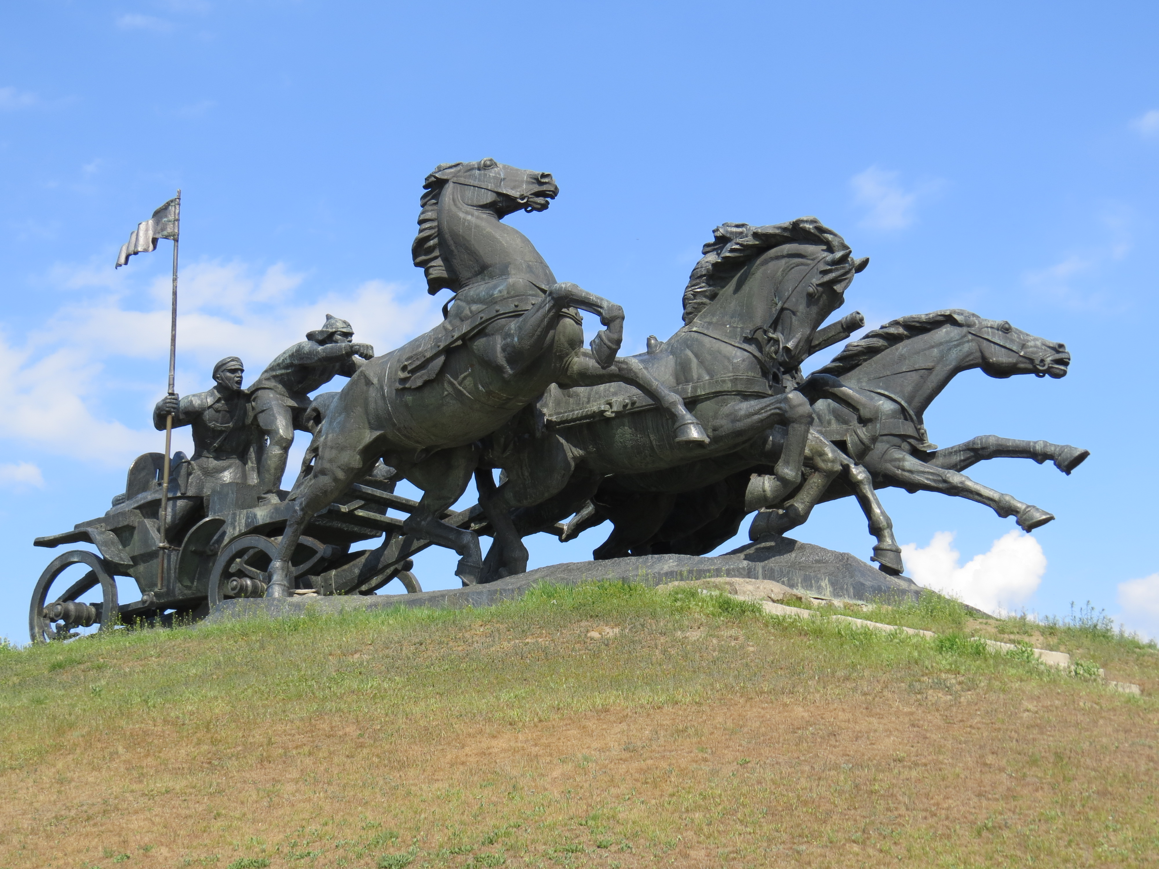 Монумент “Легендарна тачанка”, Каховка